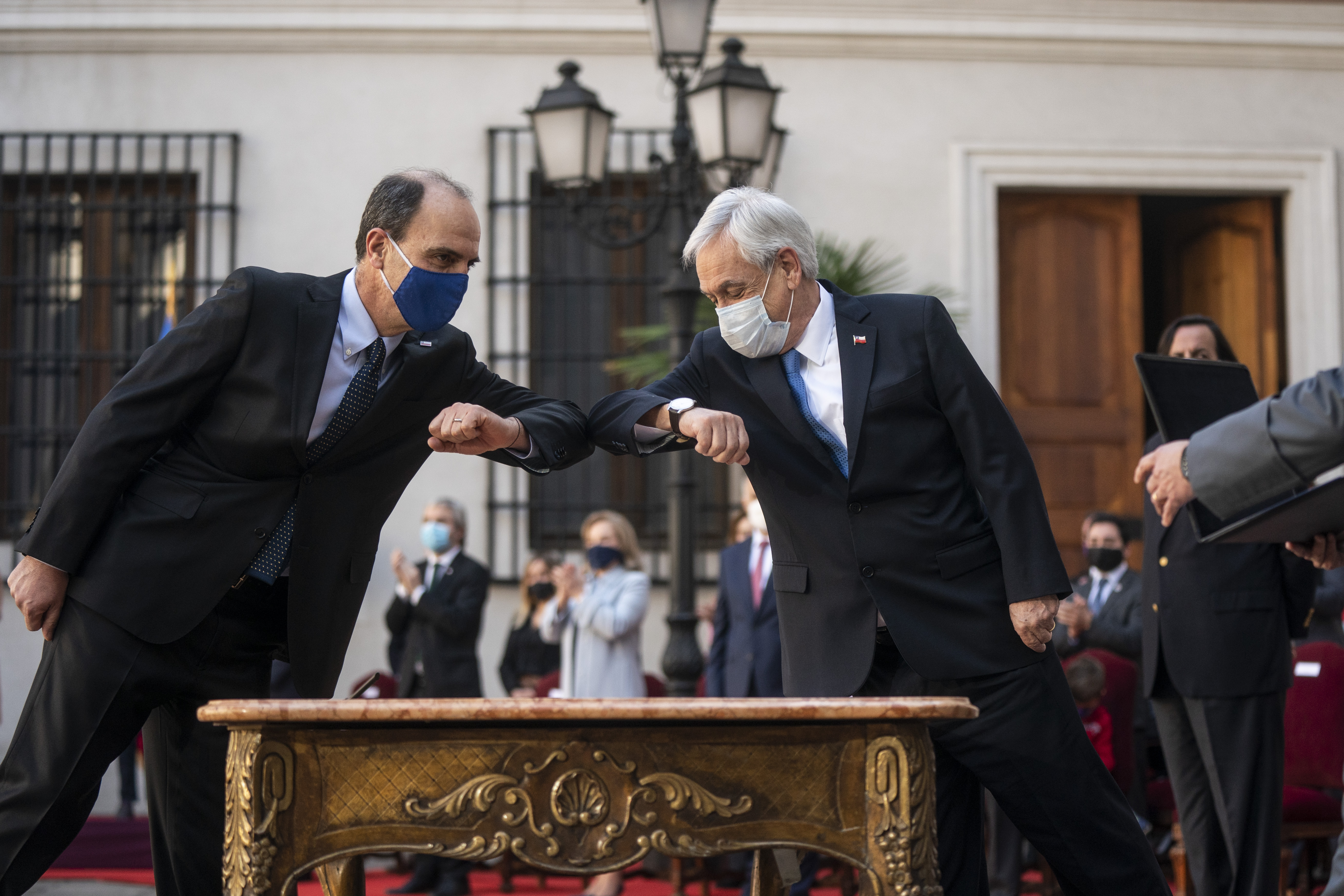 El presidente Sebastián Piñera saluda a Cristián Monckeberg tras ser nombrado Ministro Secretario General de la Presidencia de Chile.